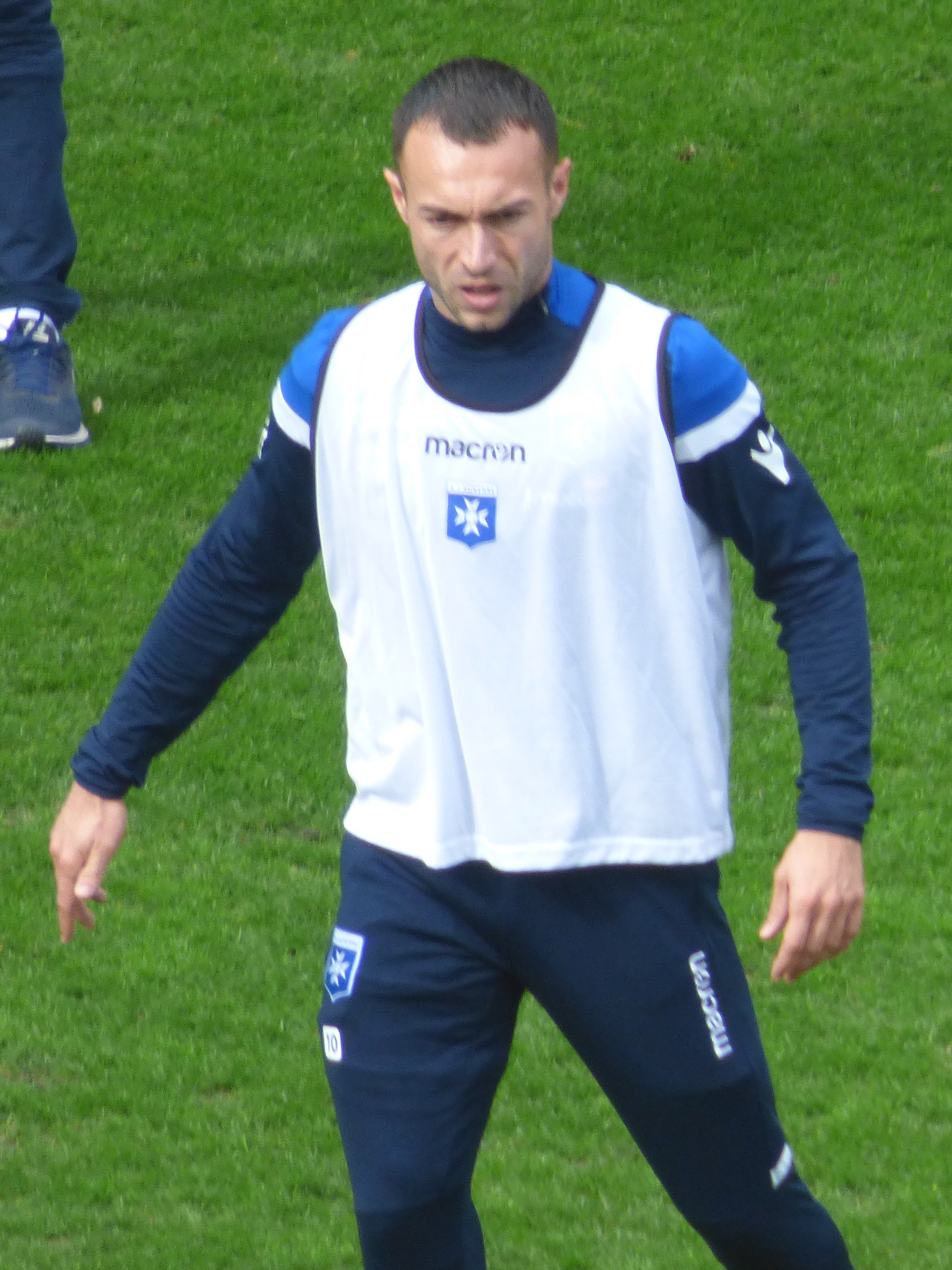 Romain Philippoteaux avant le match RC Lens - AJ Auxerre, comptant pour la 28ème journée du championnat de France de football de Ligue 2 2018-2019, le 9 mars 2019 au Stade Bollaert-Delelis.